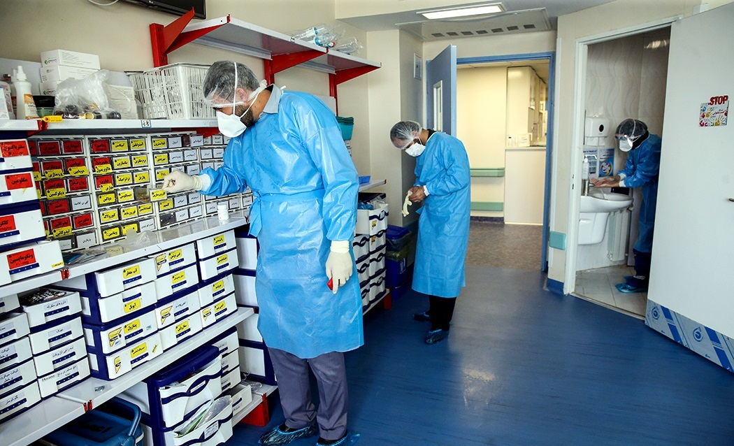 بخش ویژه «بیماران کرونا» بیمارستان فرقانی قم